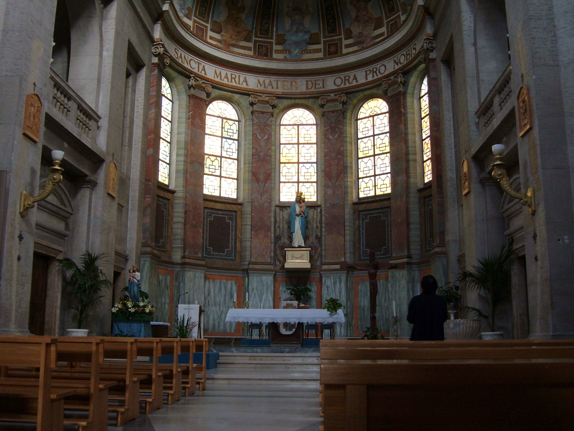 Chiesa della Gran Madre di Dio, a Roma, nel quartiere Della Vittoria.